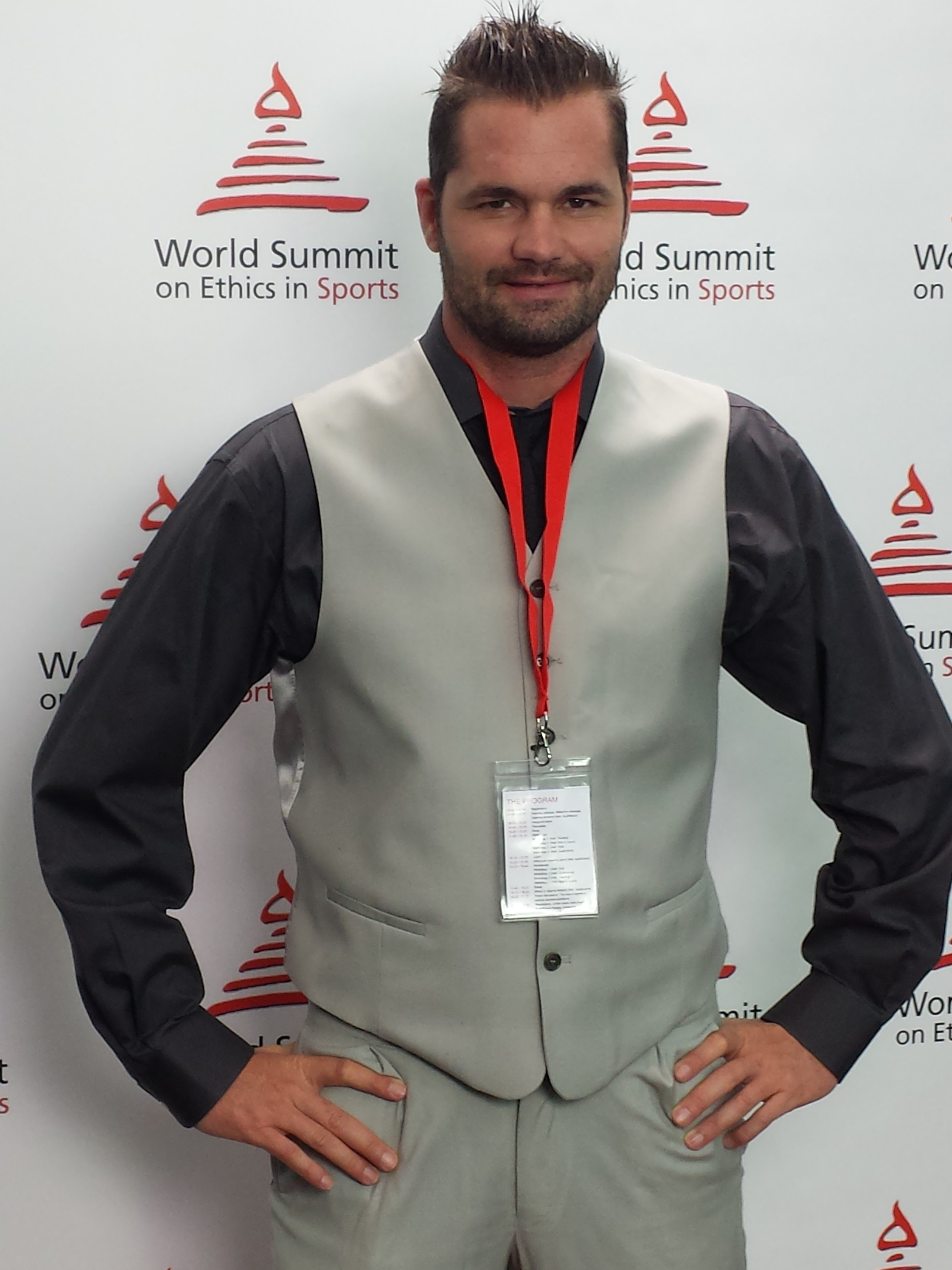 Christoph Möckli, Schweizer Motocross Fahrer